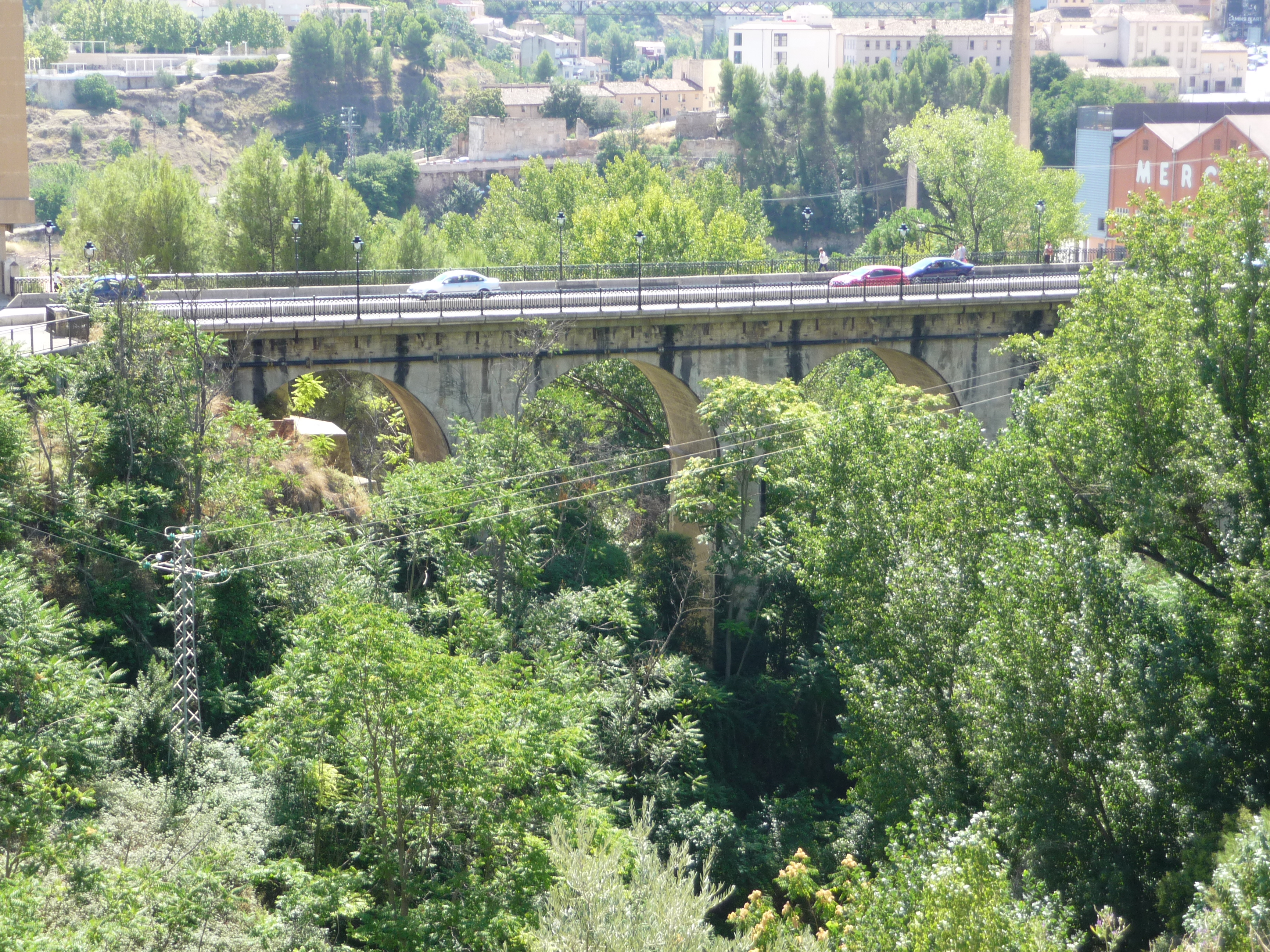 Pont de la Petxina (Alcoi)